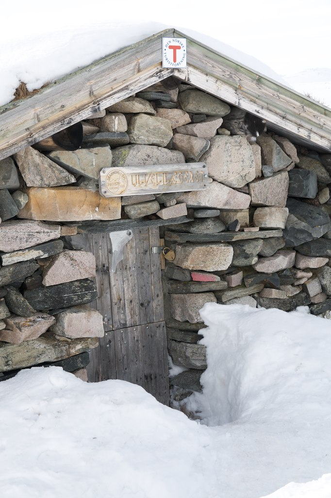 Ulvelilægret er en turisthytte tilhørende Drammens og Oplands Turistforening (DOT), et lokallag av Den Norske Turistforening (DNT). Ulvelilægret ligger i Nore og Uvdal kommune i Buskerud, på Hardangervidda